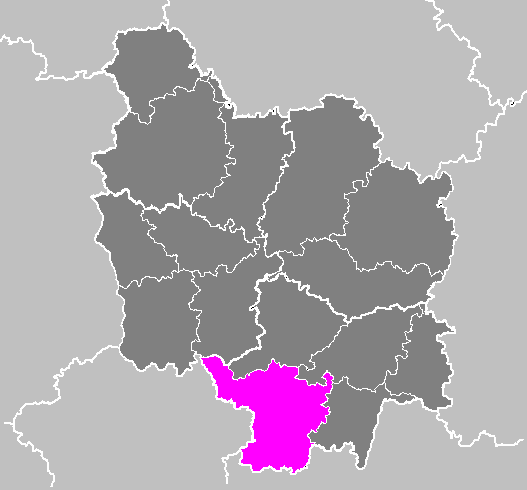 Maps of arrondissements and cantons of France: Arrondissement de Charolles.PNG (Région Bourgogne)